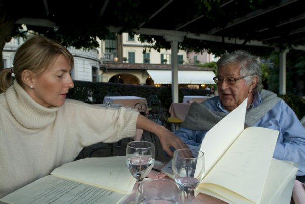 Gene Gutowski - Diner à Bellagio avec son petit fils ,Jordan Waugh, et sa femme Asia